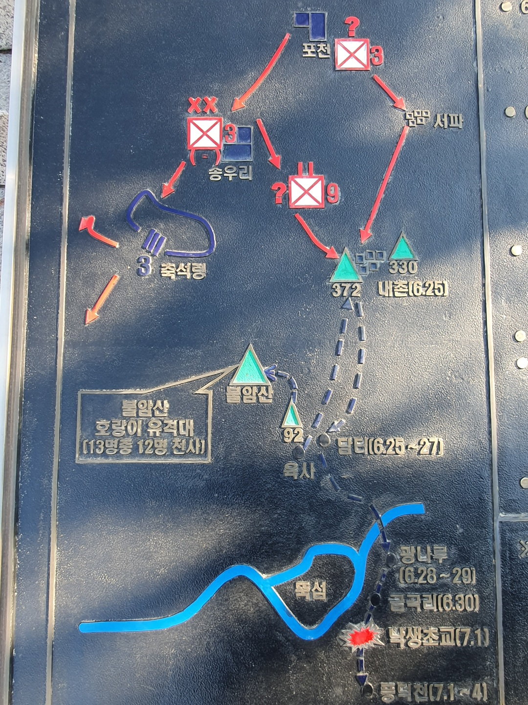 전투 요도